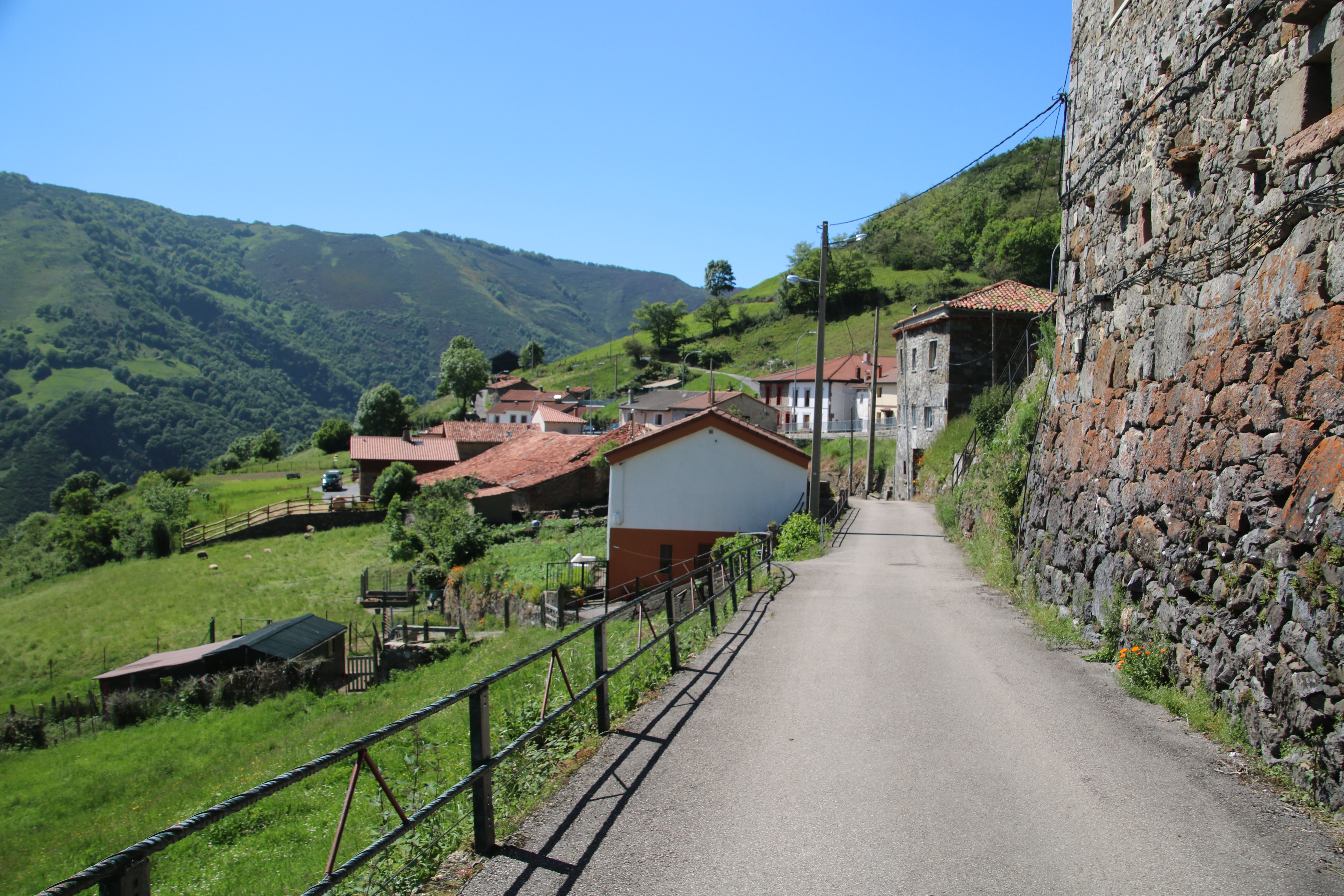 Camino de San Salvador_tappa da Poladura de la Tercia a Pajares